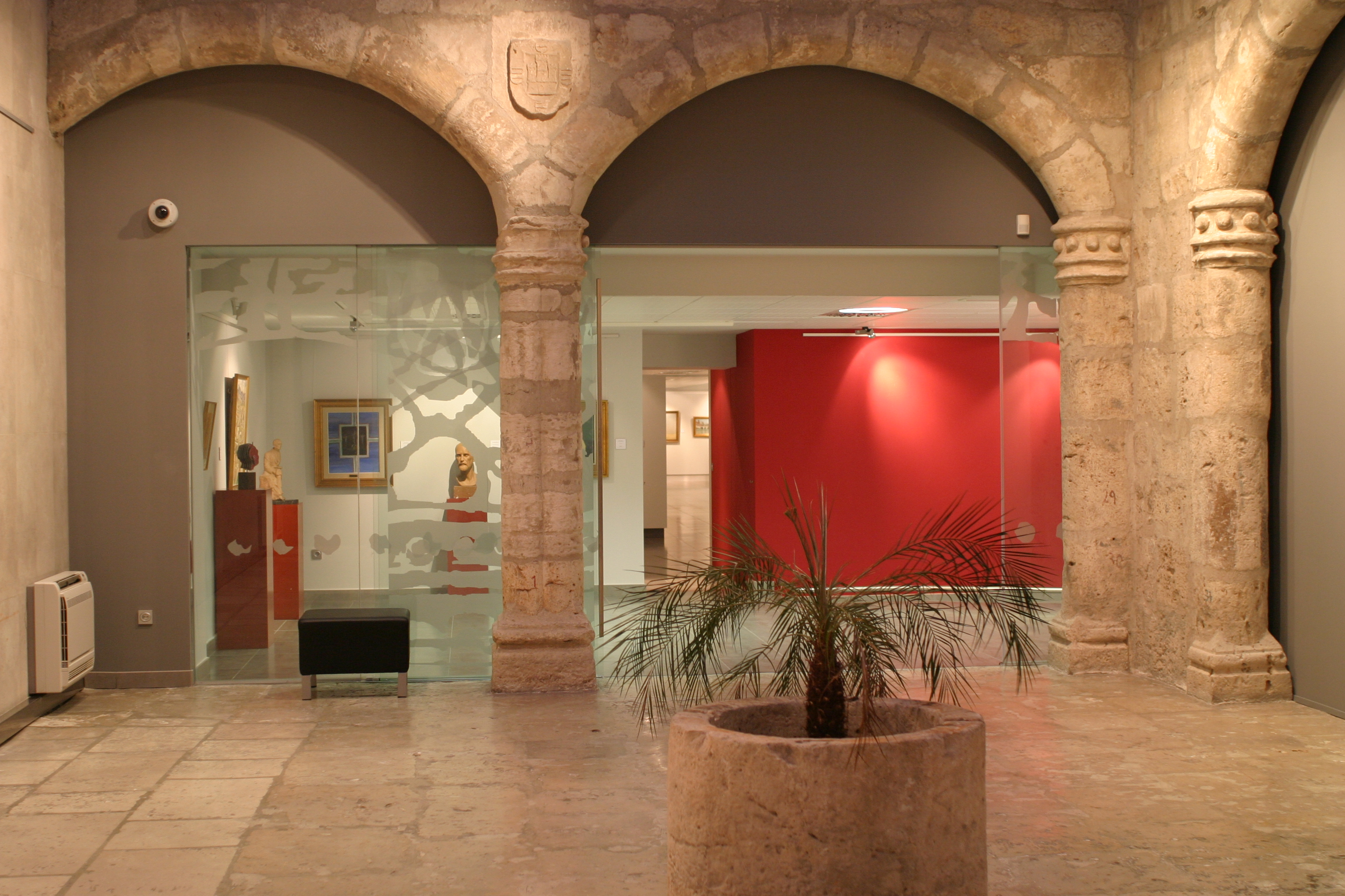 Patio gótico de la Casa de los Carrillo-Bernal (siglo XV) y galería de arte del Museo de la Universidad de Valladolid